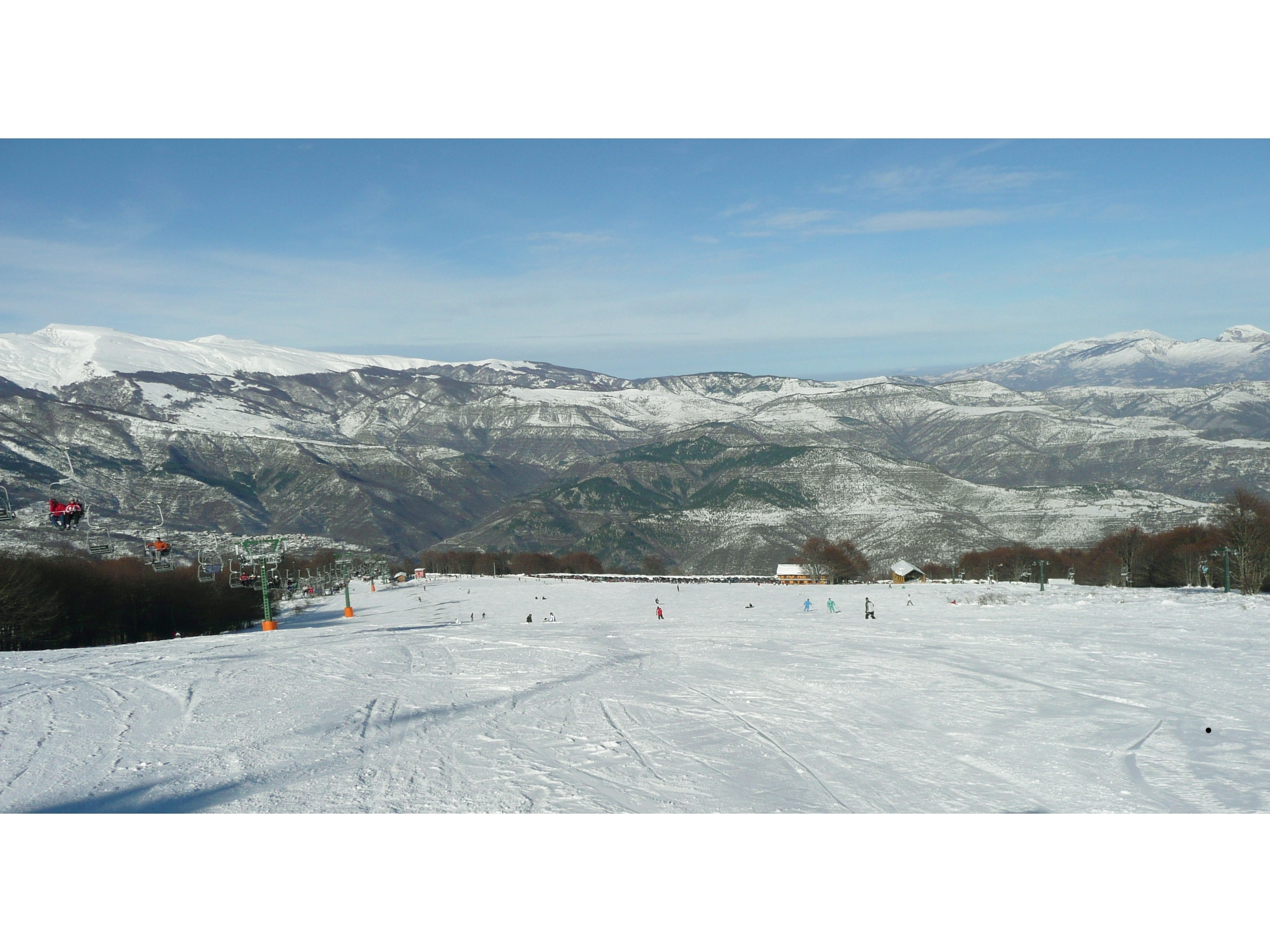 Prato Selva - Abruzzo - Italy